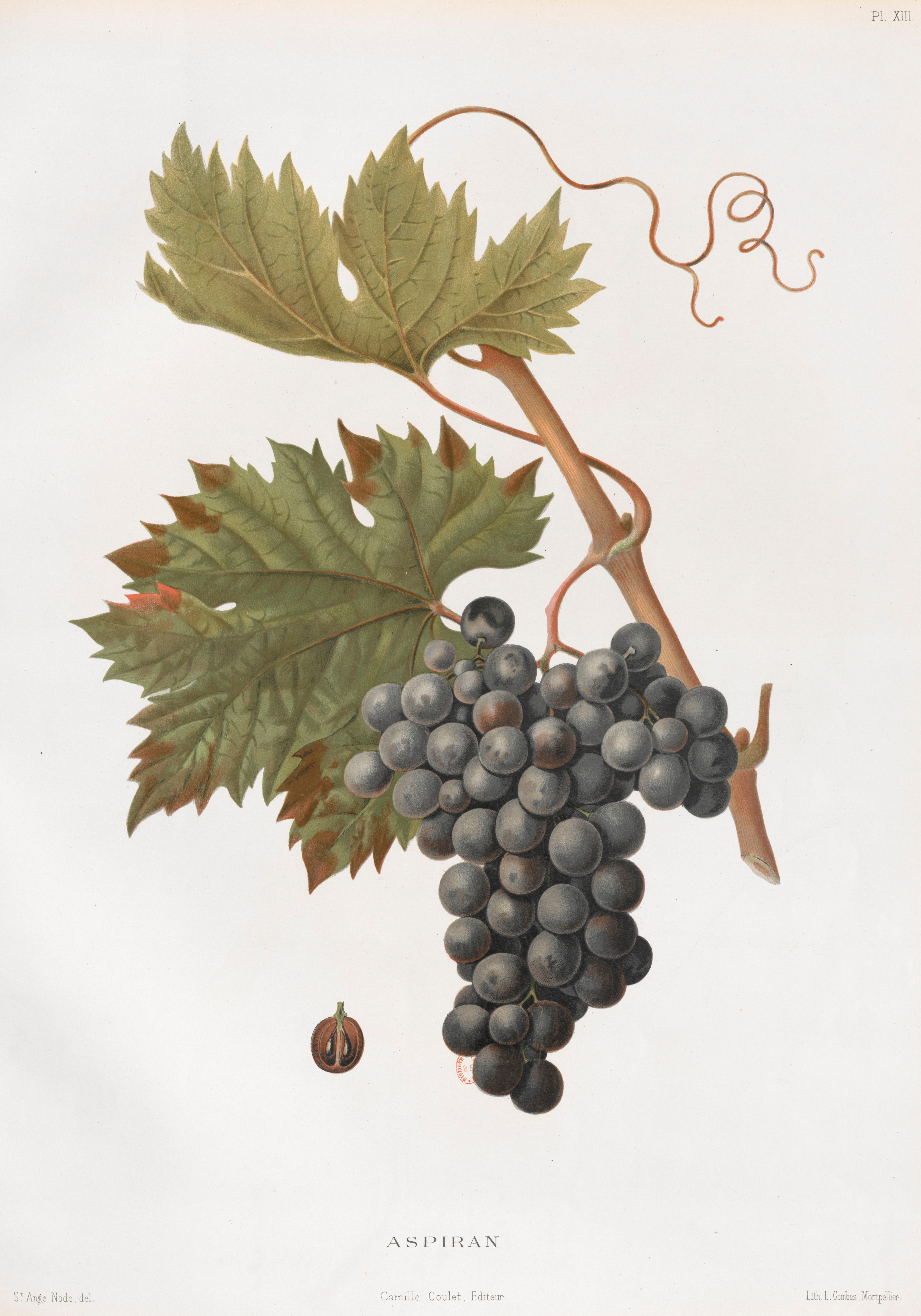 Lithographie du cépage Aspiran